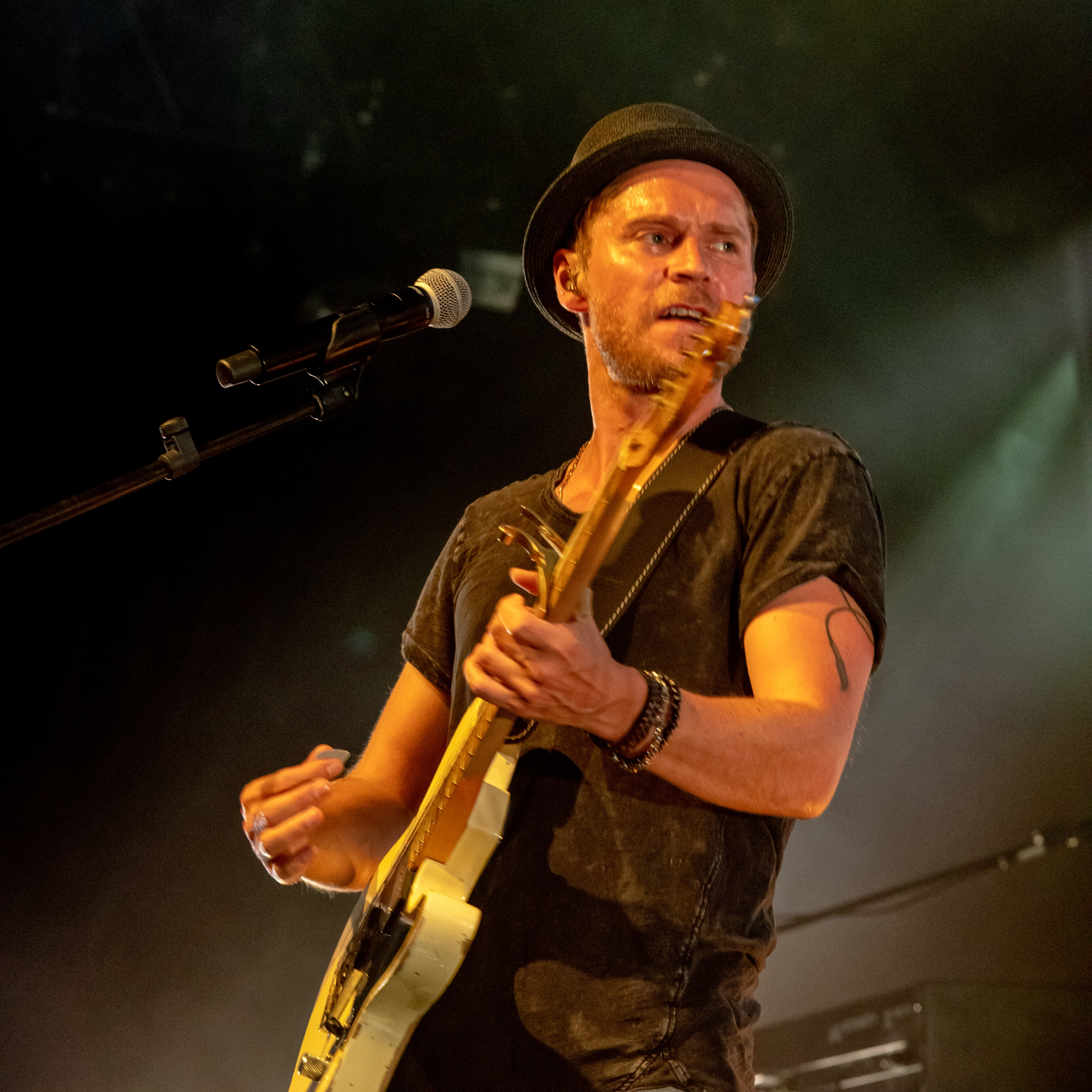 Bilder vom Zelt Musik Festival 2018 in Freiburg im Breisgau Johannes Oerding und Band am 30.07.2018